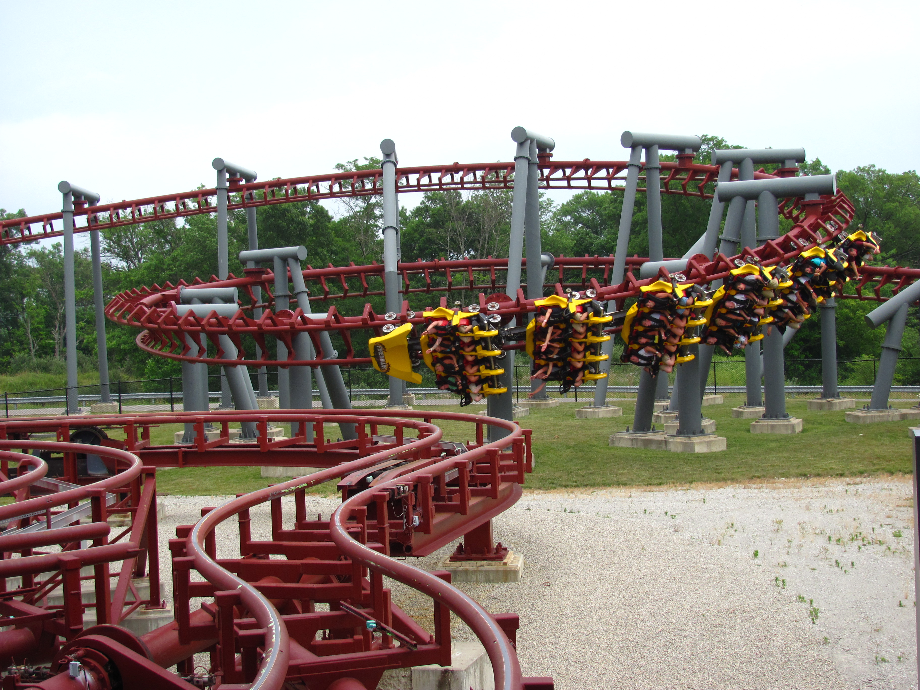 Firehawk